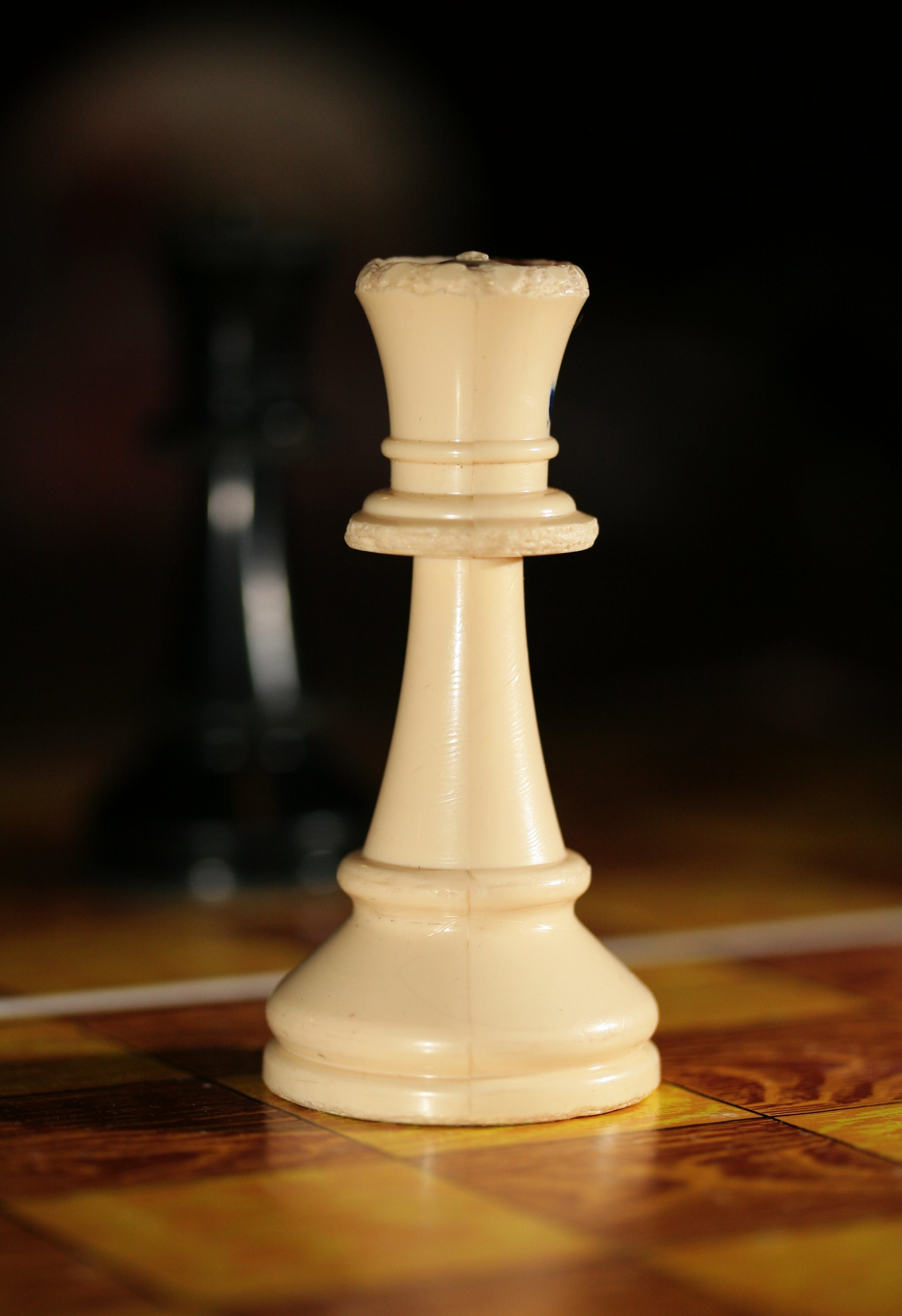 Chess queen 0964